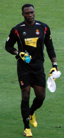 Kameni